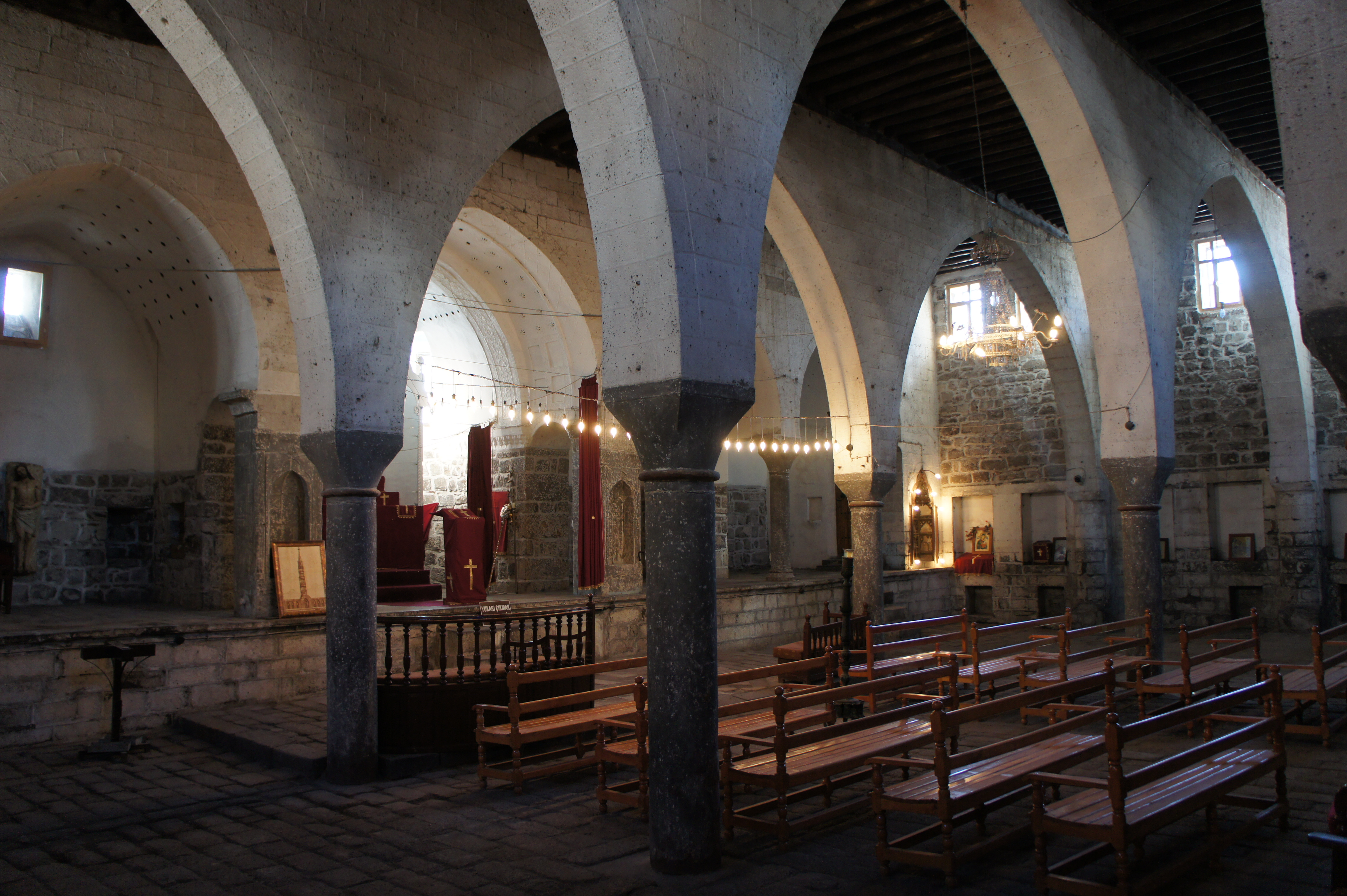 Kurdî: Hundirê Dêra Marpetyun a keldaniyên katolîk a Amedê.